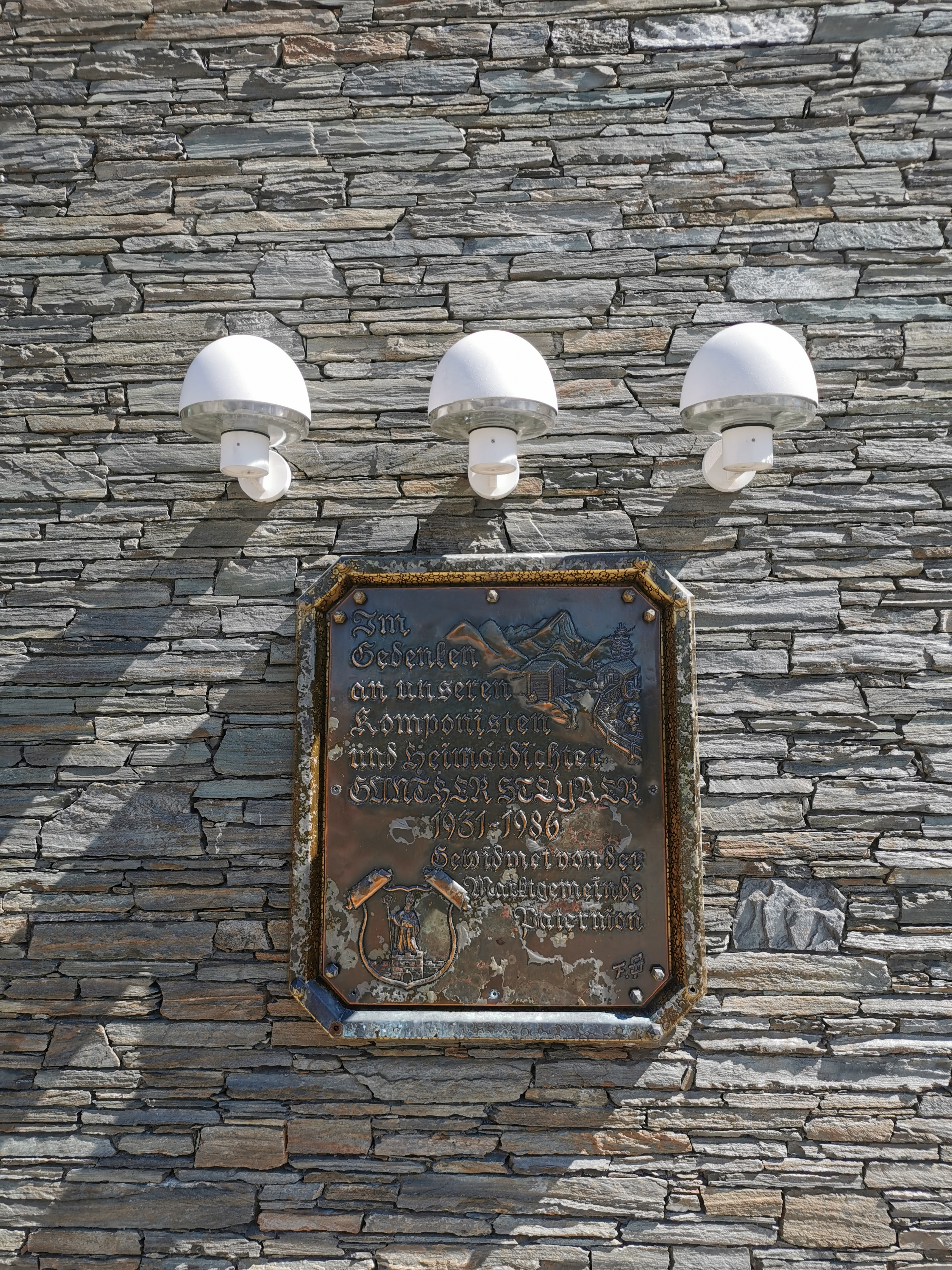 Gedenktafel für den Dichter und Komponisten Günther Steyrer in Feistritz/Drau